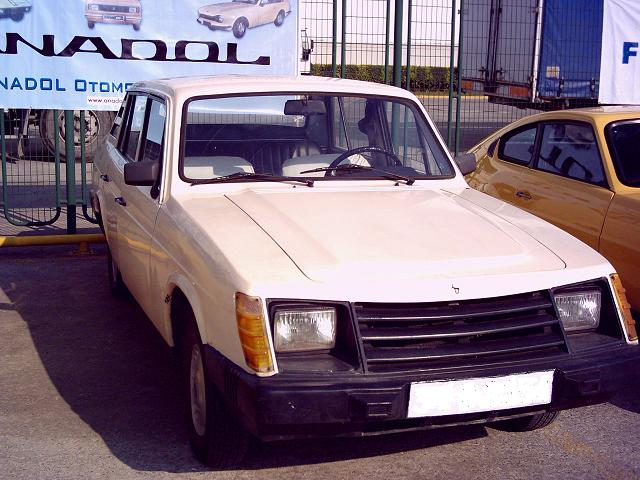 Türkiye'de seri olarak üretilen ilk otomobil markası Anadol'dan bir görünüm.